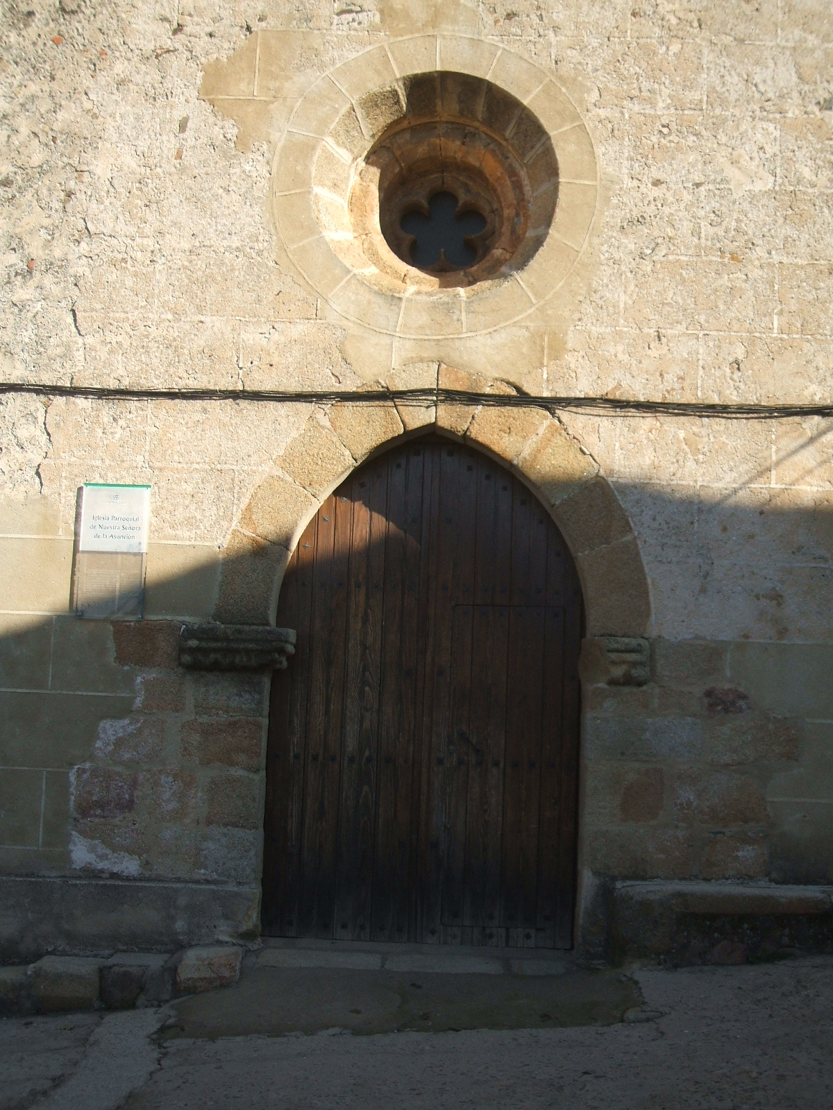 Villanueva de la Sierra (Cáceres)